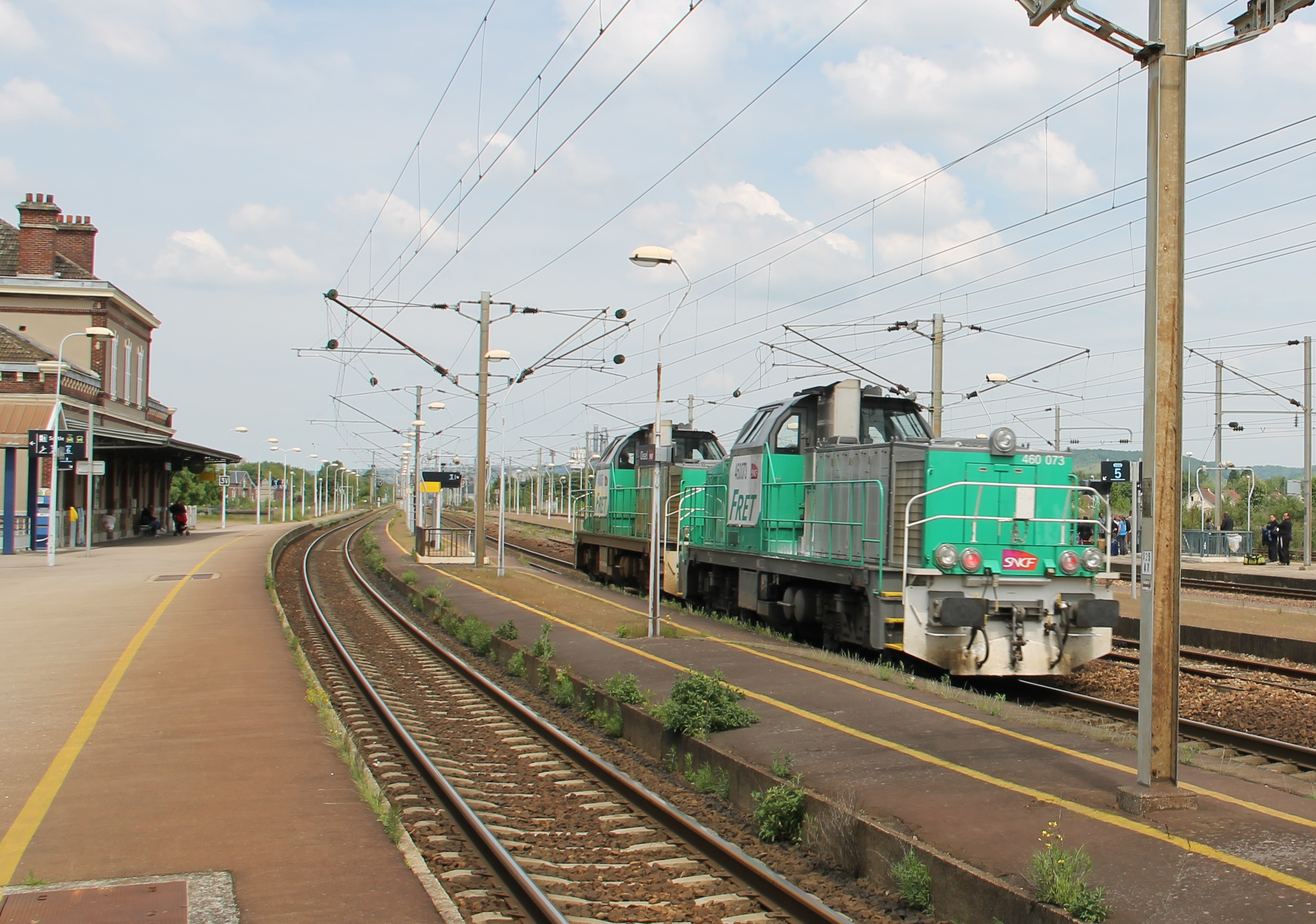 Unité multiple de BB 66000 à Oissel